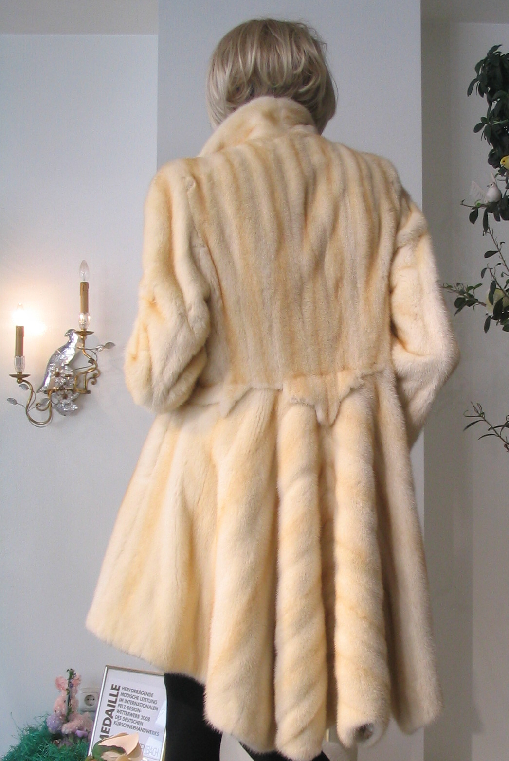 Palomino Nerzmantel. Gesehen im Pelzhaus Schenkenbach, Düsseldorf, 2012.